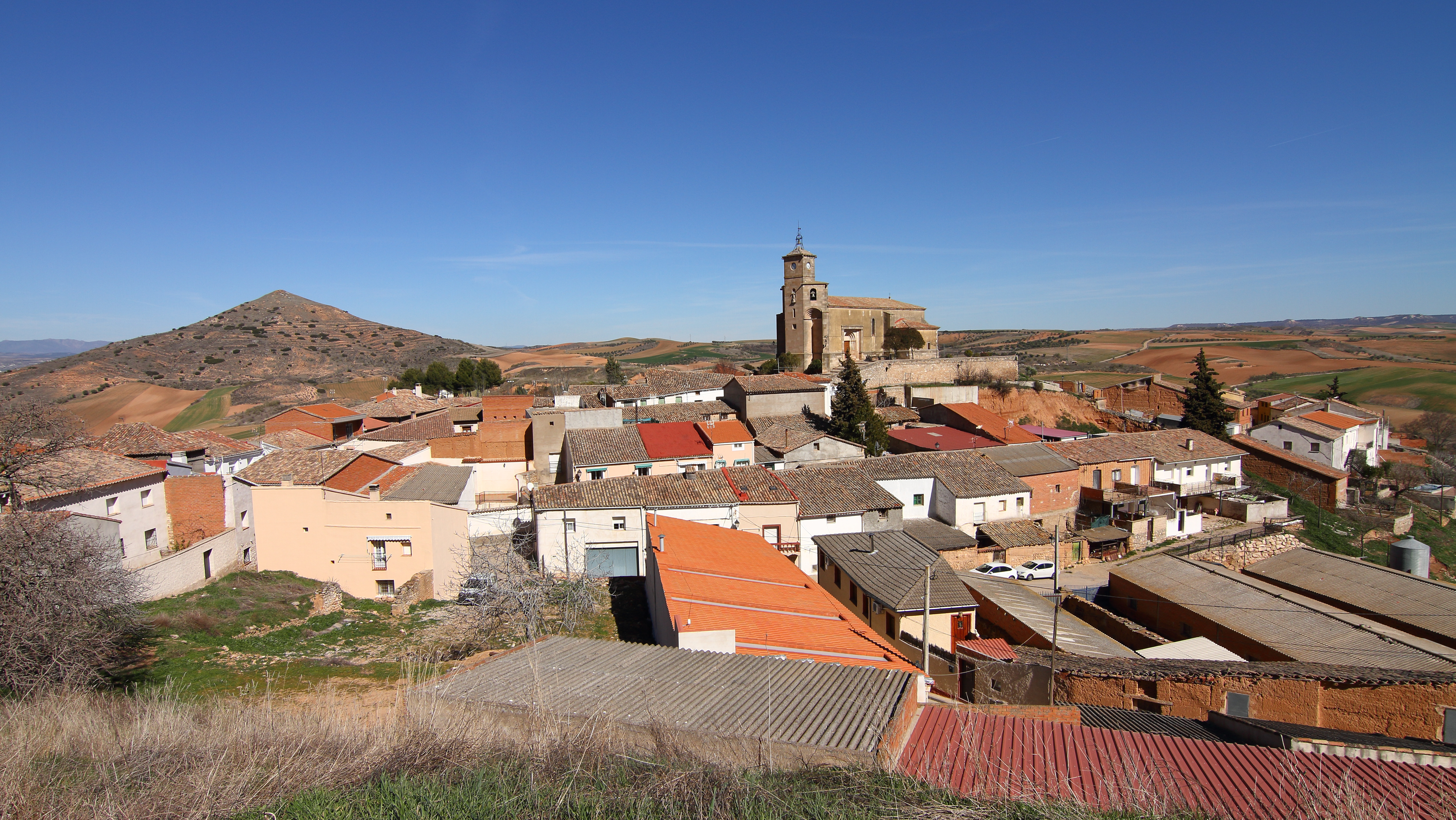 Alarilla